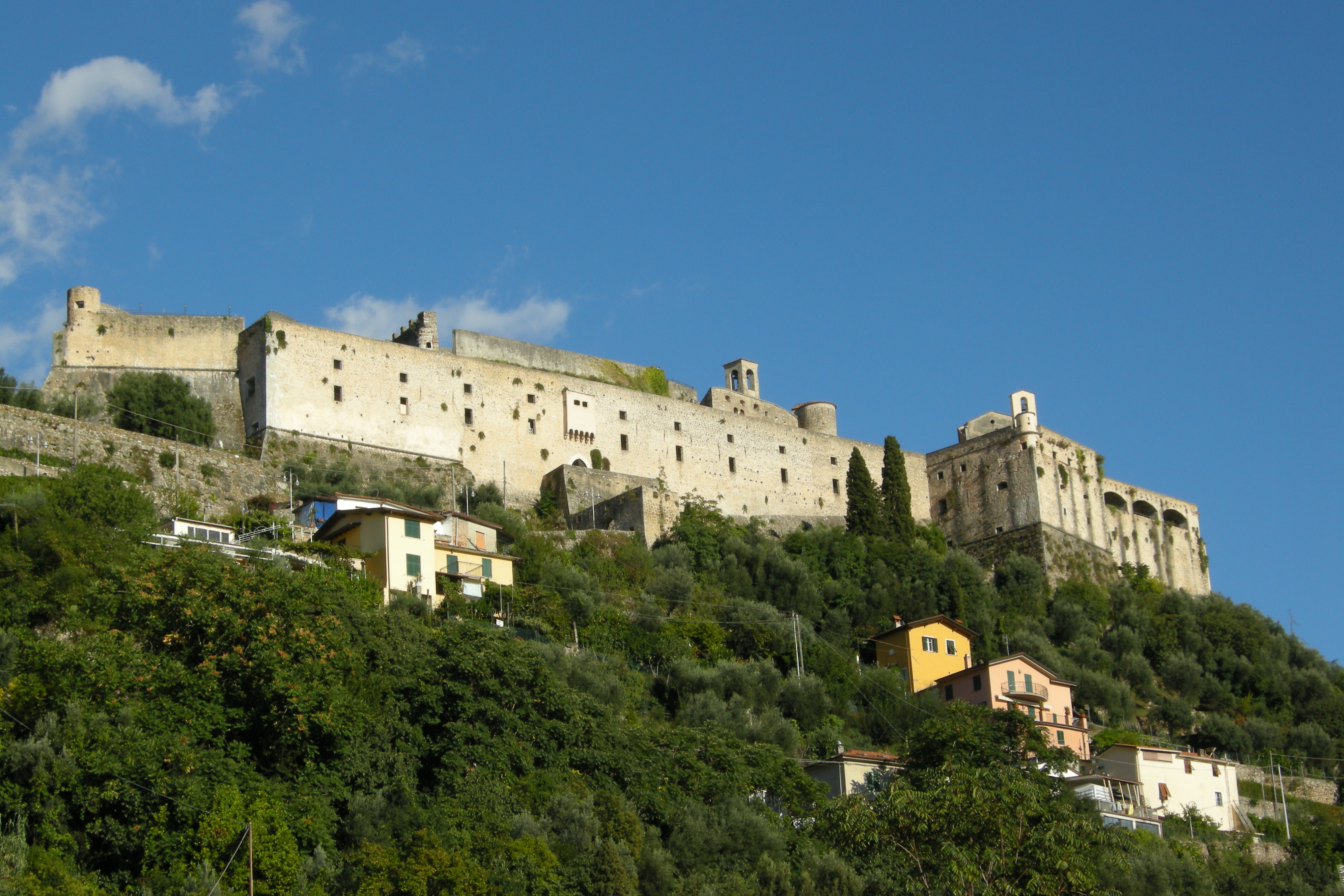 Castello Malaspina di Massa. Comune di Massa, Italia